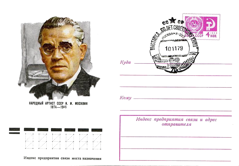 Иван Михайлович Москвин (1874 — 1946) — народный артист СССР. Художественный маркированный конверт СССР. 1974